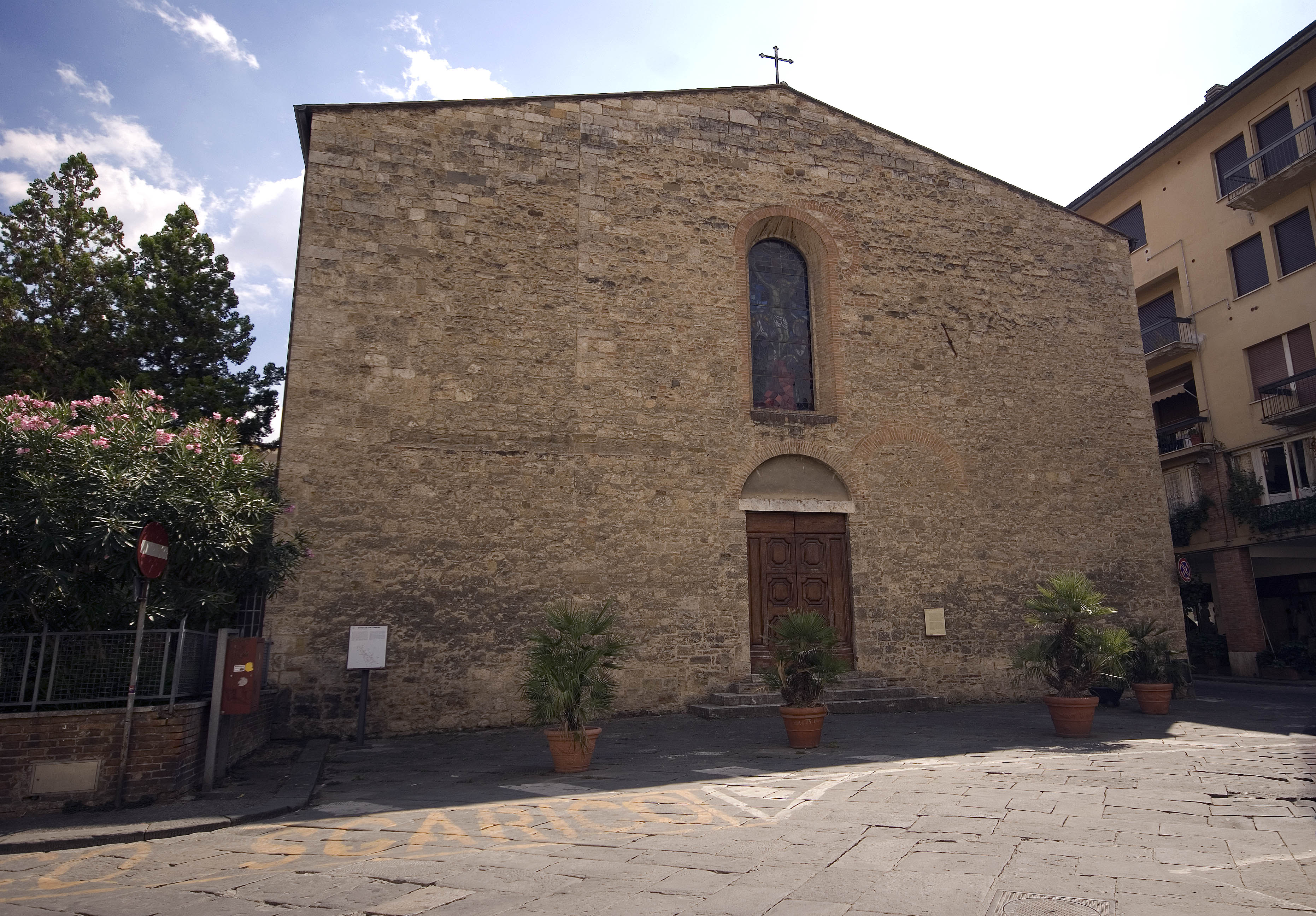 see title